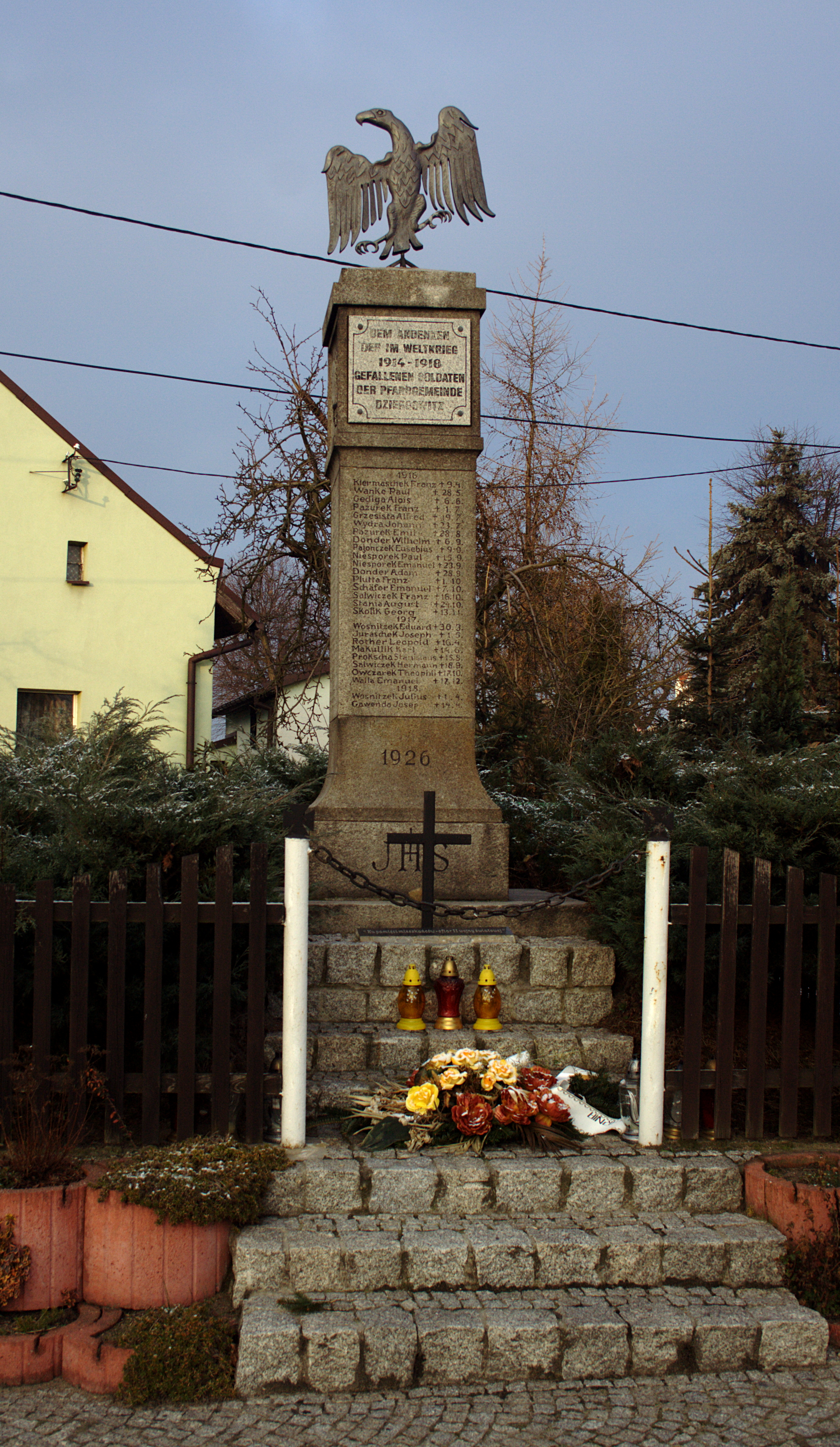 Pomnik poległych w Dziergowicach